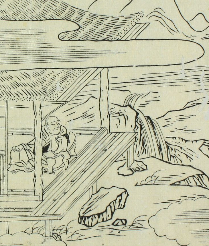 shiba ujiyori